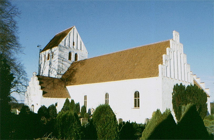 Undløse Kirke